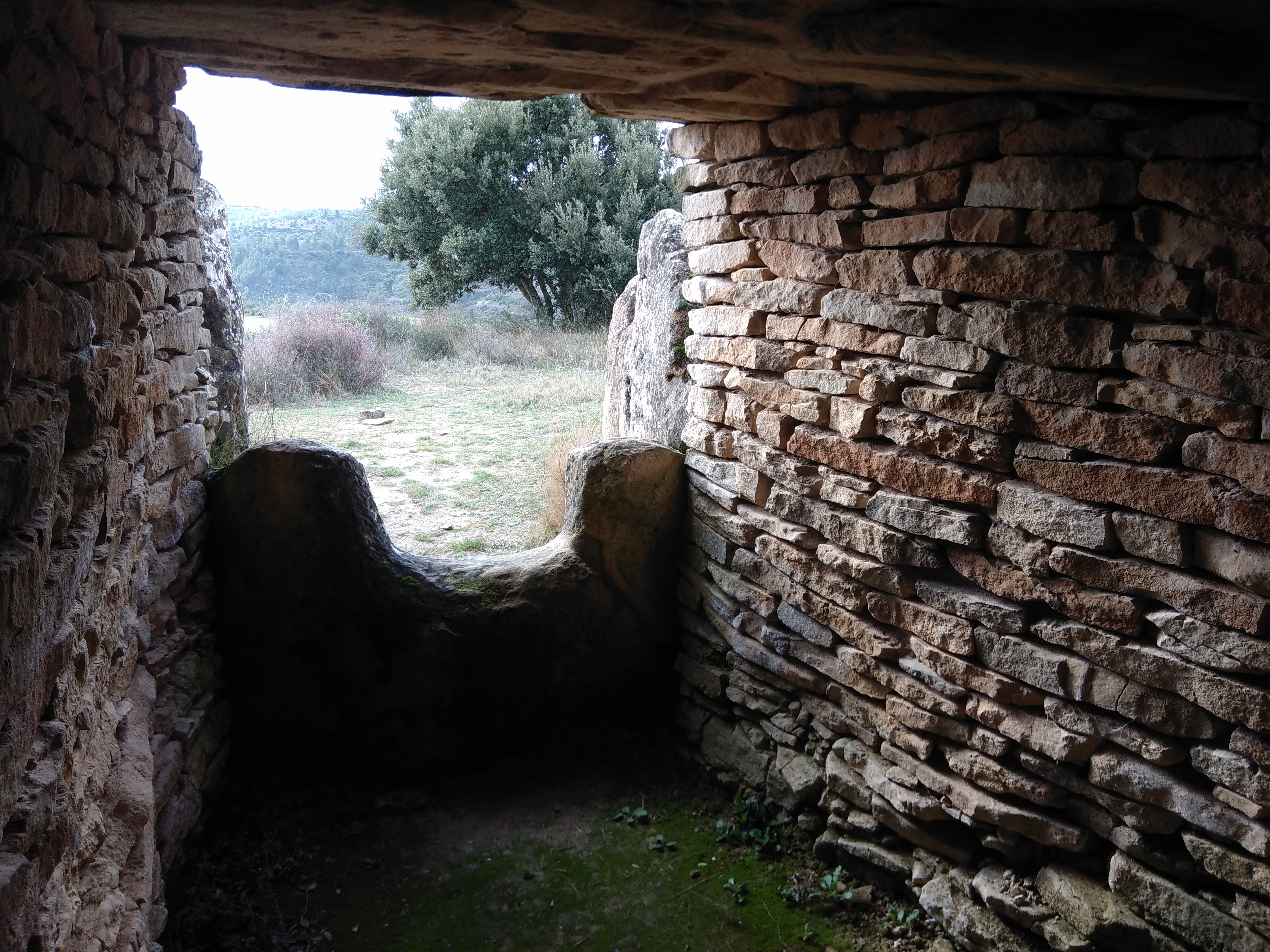 Hipogeo de Longar, vista desde la cámara sepulcral. Viana, Navarra. España